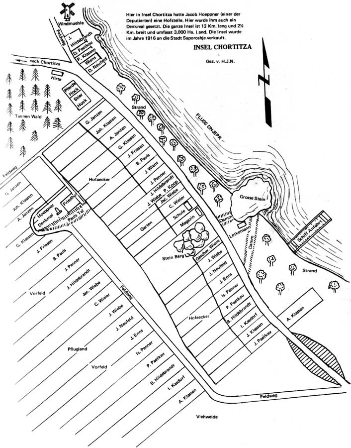 The plan of the Mennonite Island_Khortitsa colony, 1867.